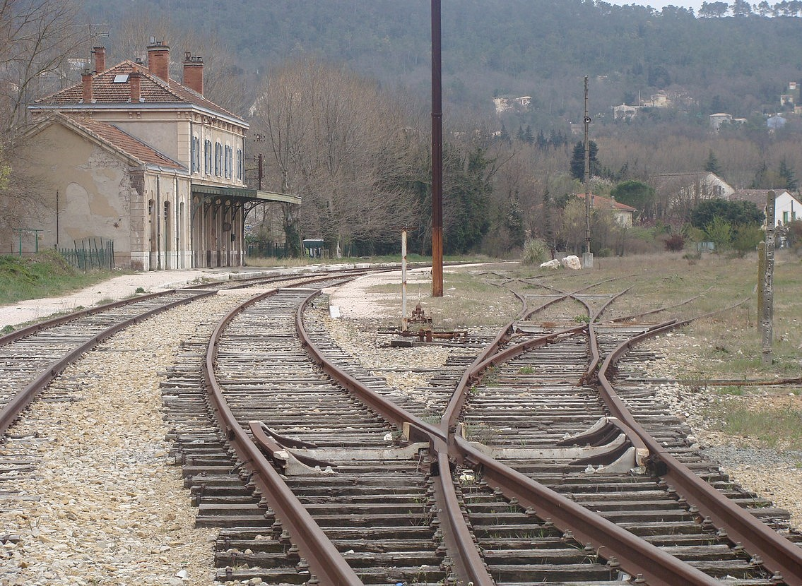 La gare de Brignoles (Var), sur la ligne Gardanne - Carnoules ; vue d'ensemble des voies (état actuel).